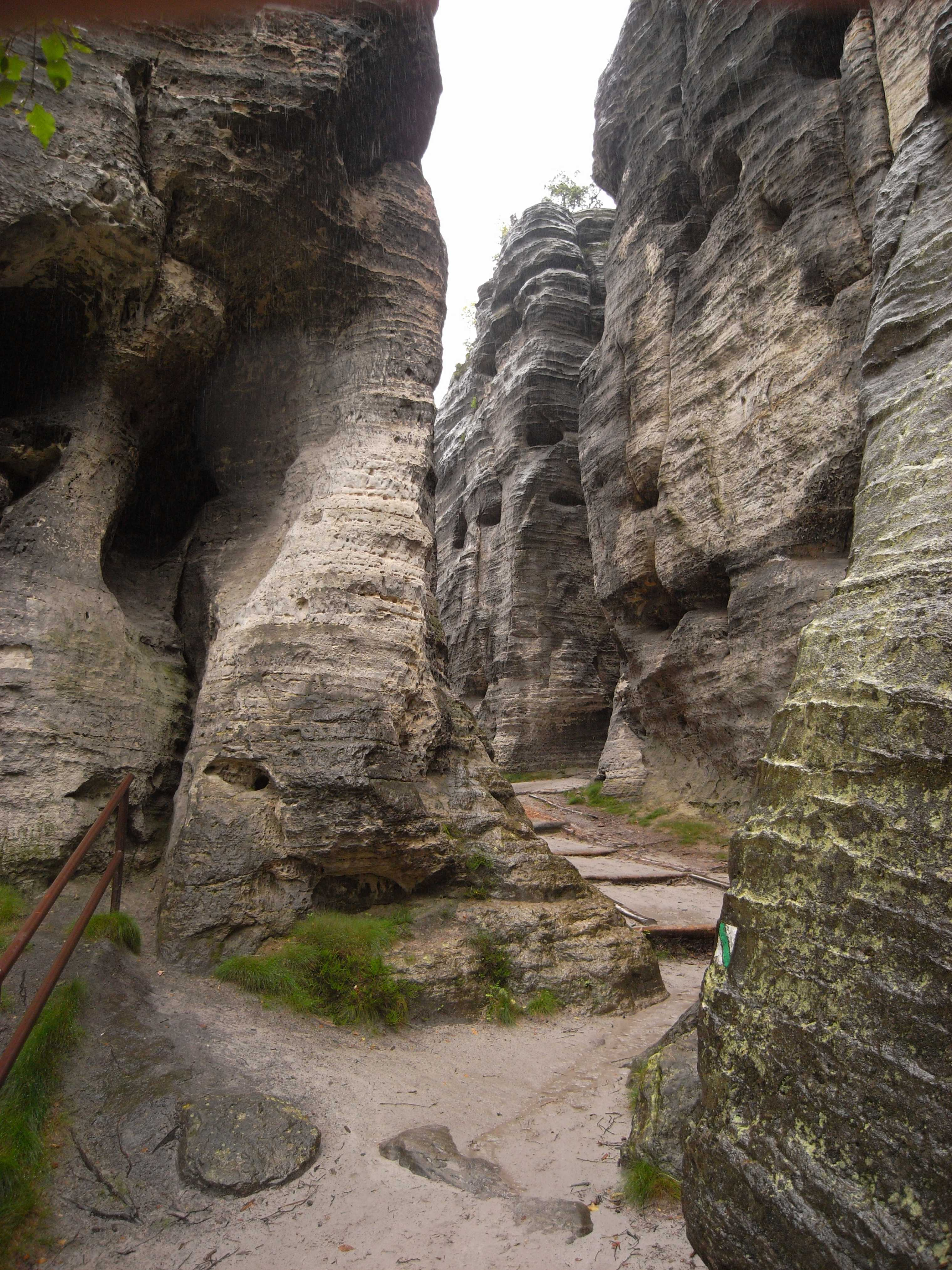 Tyssaer Wände, Südfront (Böhmische Schweiz, Tschechische Republik)